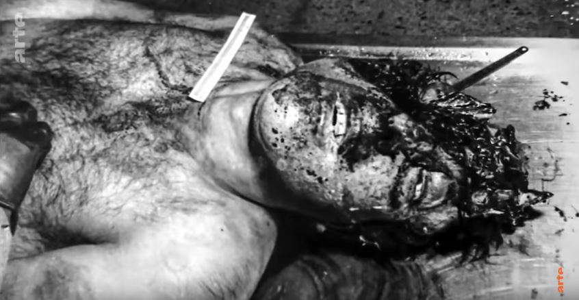 il viso martoriato dal kalashnikov di Pino Greco di Stefano Bontate